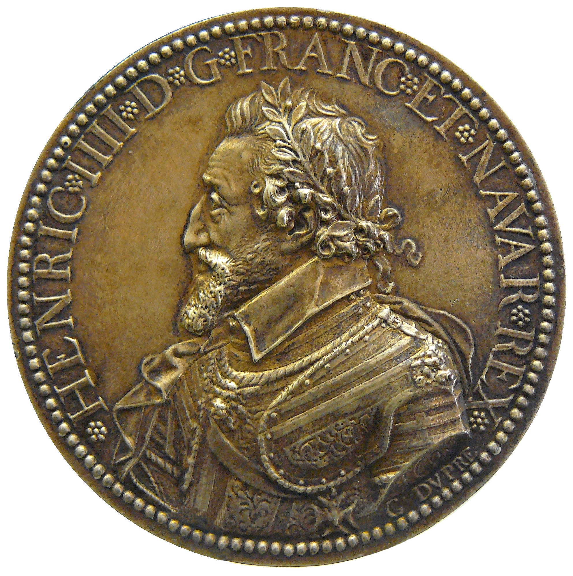 Médaille à l'effigie d'Henri IV en argent doré dite "L'Hercule gaulois" - Diamètre 68 mm - Revers : Hercule - VINCES · ROBVR · ORBIS - Mazerolles 628 - Cabinet des Médailles, série royale Henri IV n° 284